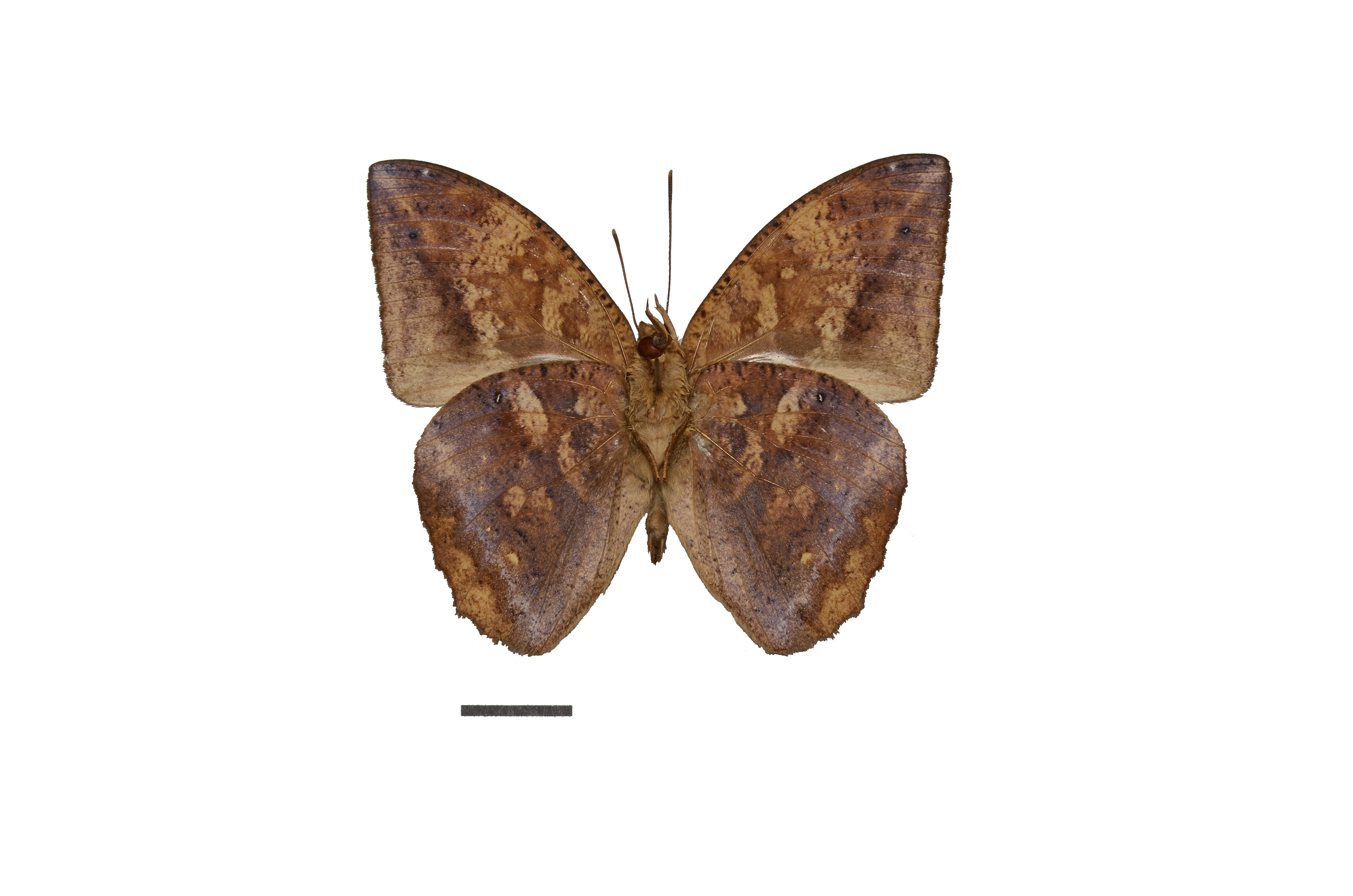 eastern Ecuador